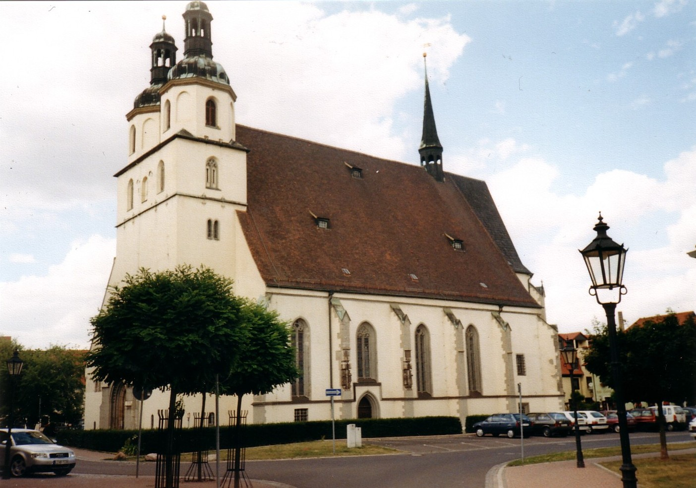 Pegau Sankt-Laurentius-Kirche